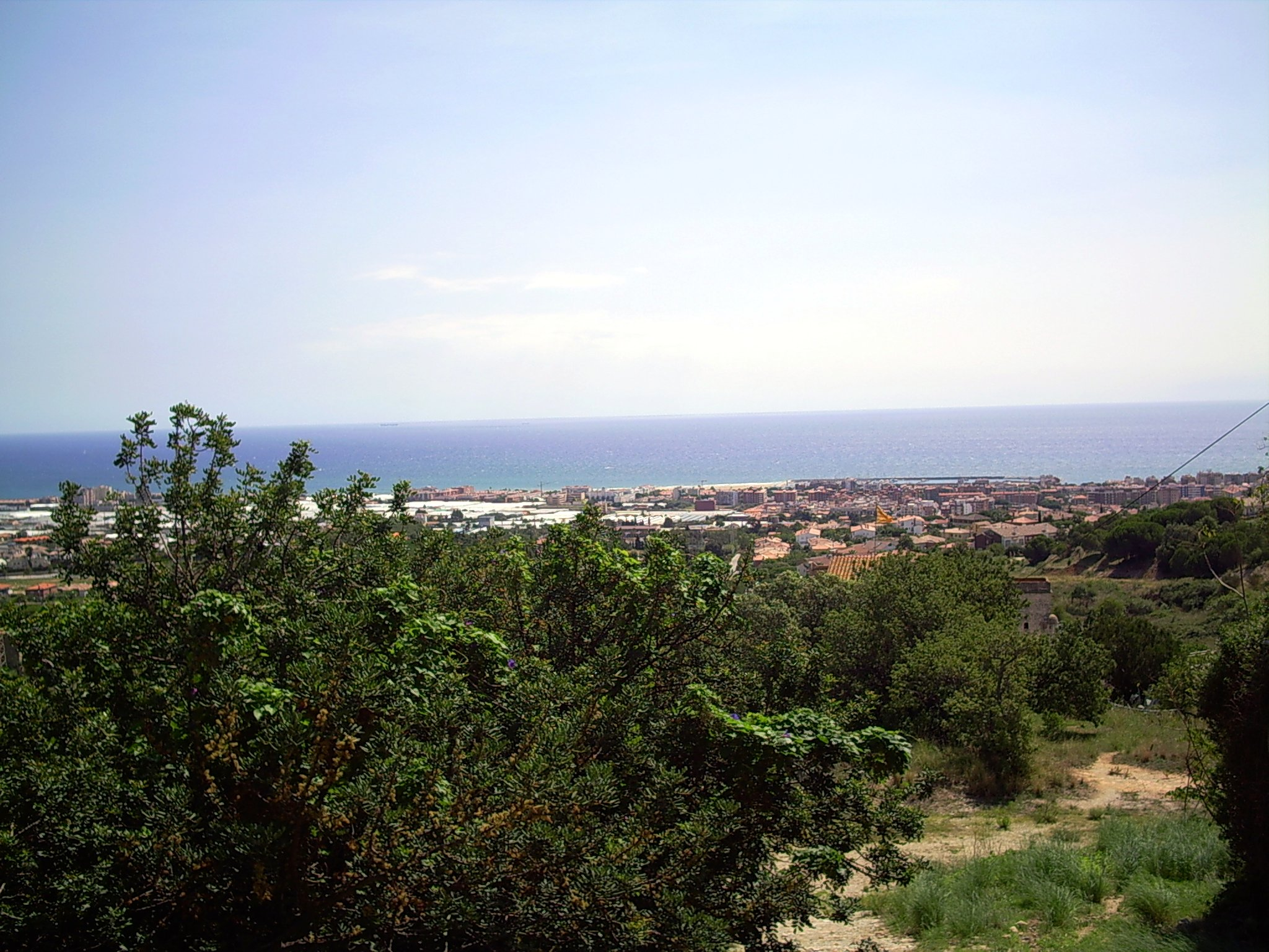 Vista general de Premià de Mar, des de La Cisa.